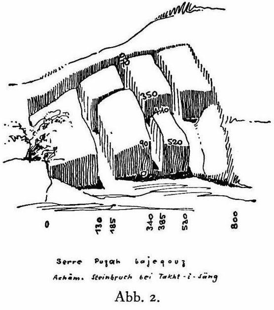 قاشی کارل برگنر از معدن سنگ هخامنشی بانش در سال 1314